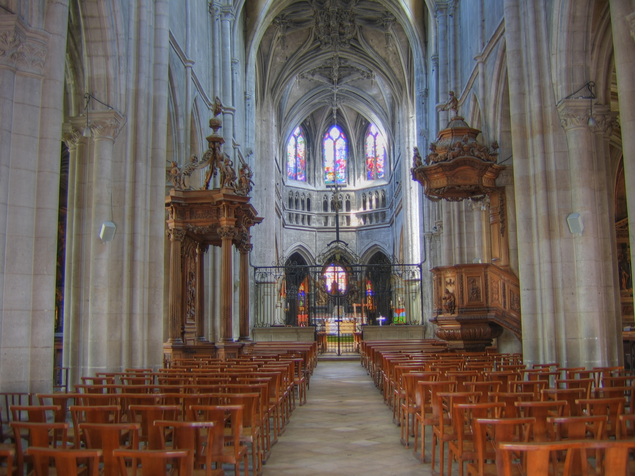 La Basilique Saint Jean Baptiste de Chaumont (52)